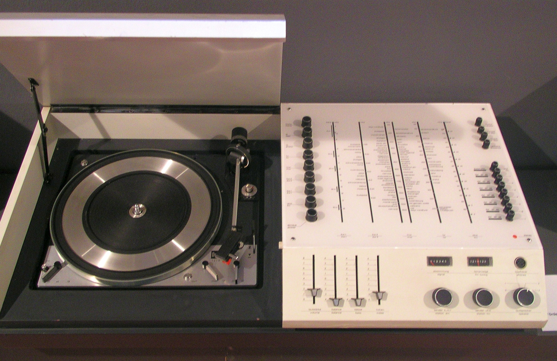 WEGA Studio 3214 Hifi mit Dual 1219 Plattenwechsler und Telefunken Lautsprecher L 250, Baujahr 1972